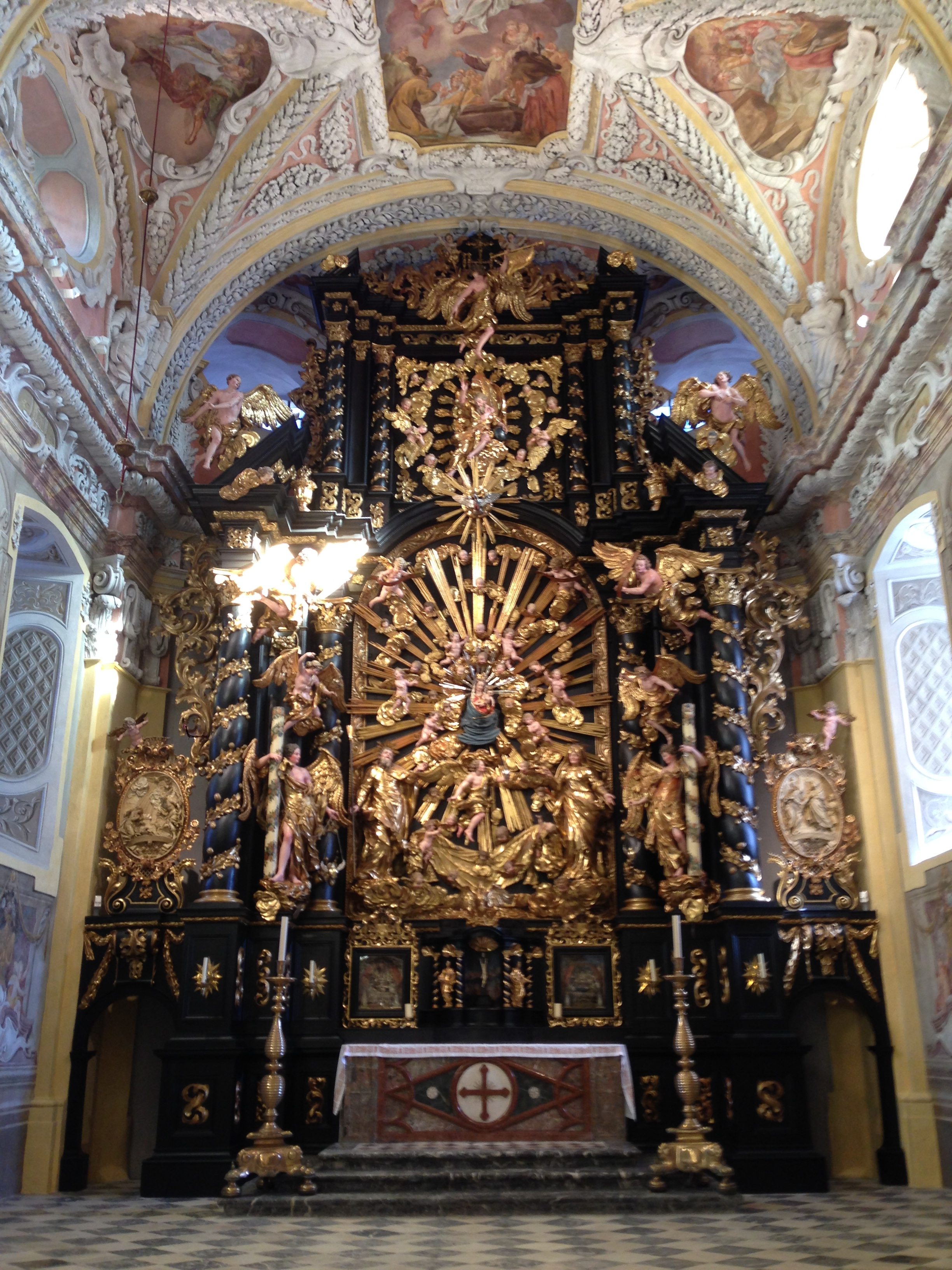 Hochaltar der Wallfahrtskirche Frauenberg an der Enns (bei Admont), Österreich